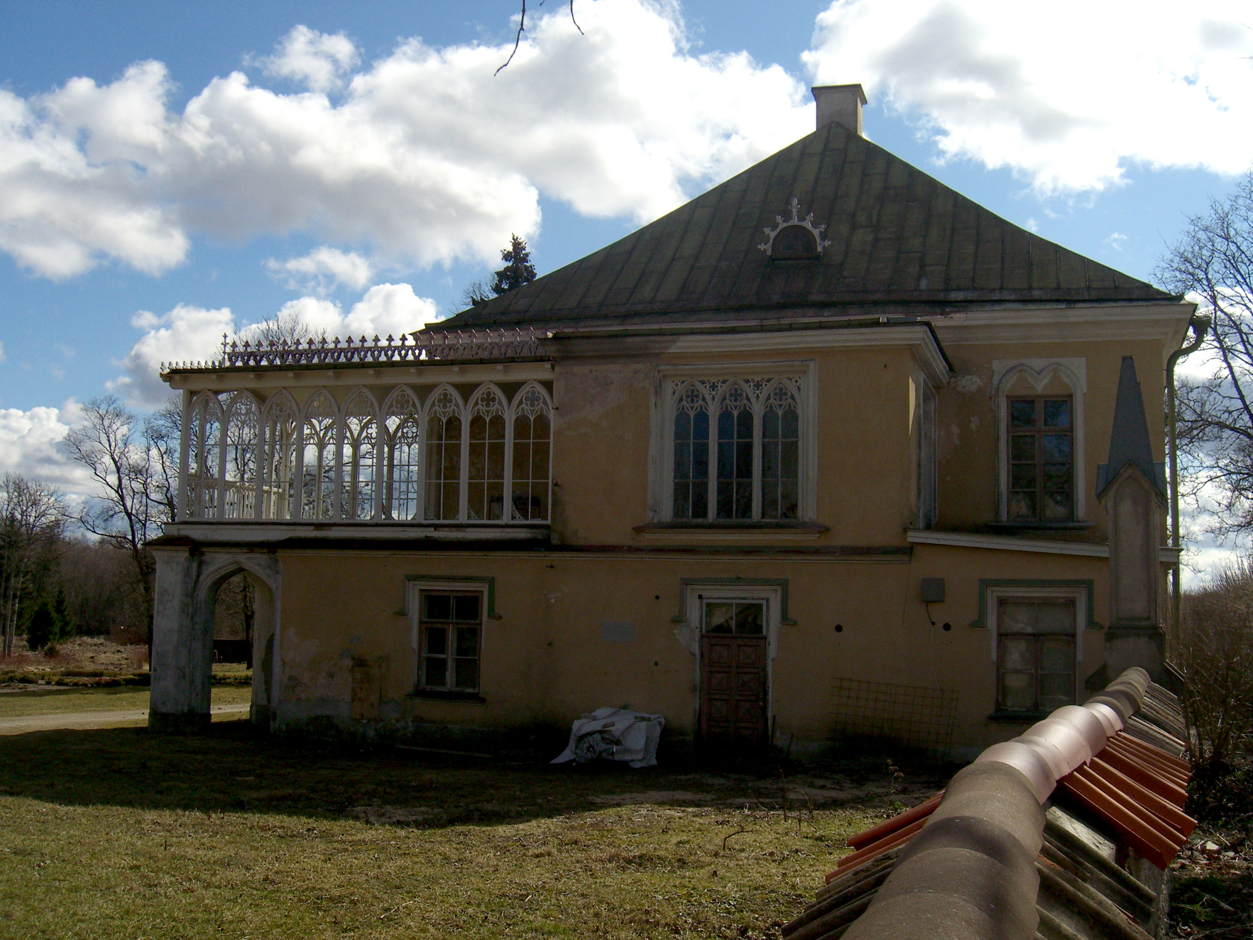 Lohu mõis